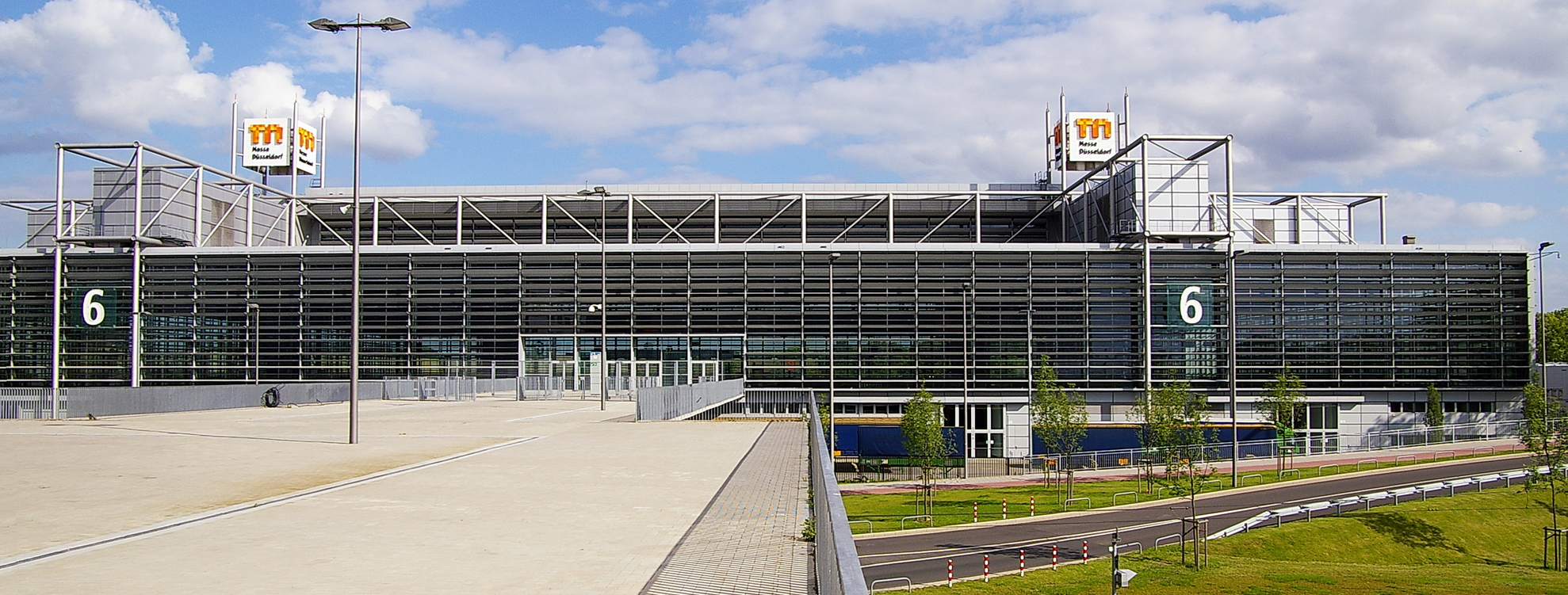 Rheinhalle (Halle 6) der Messe Düsseldorf in Düsseldorf